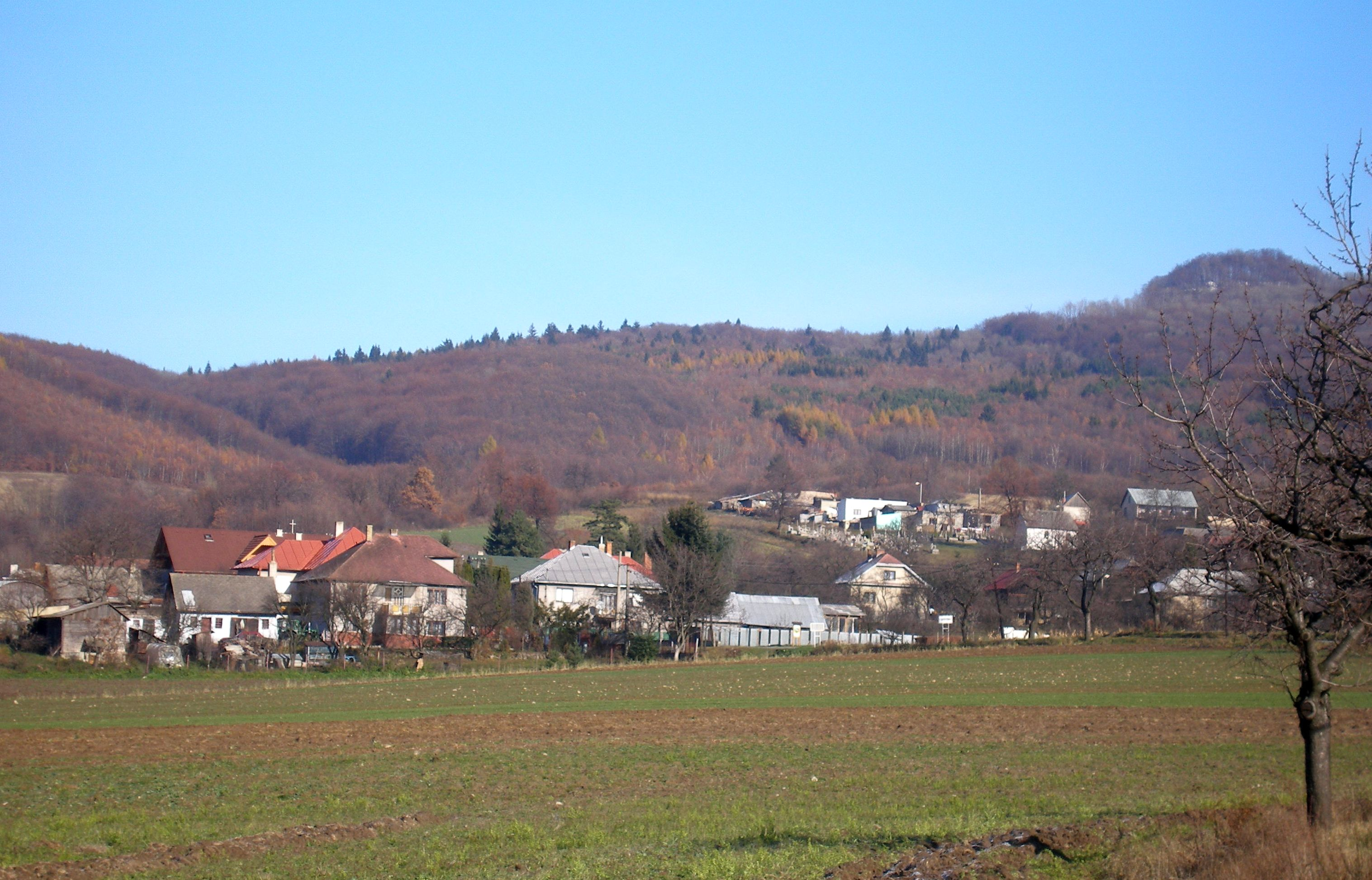 Obec Lesíček v okrese Prešov